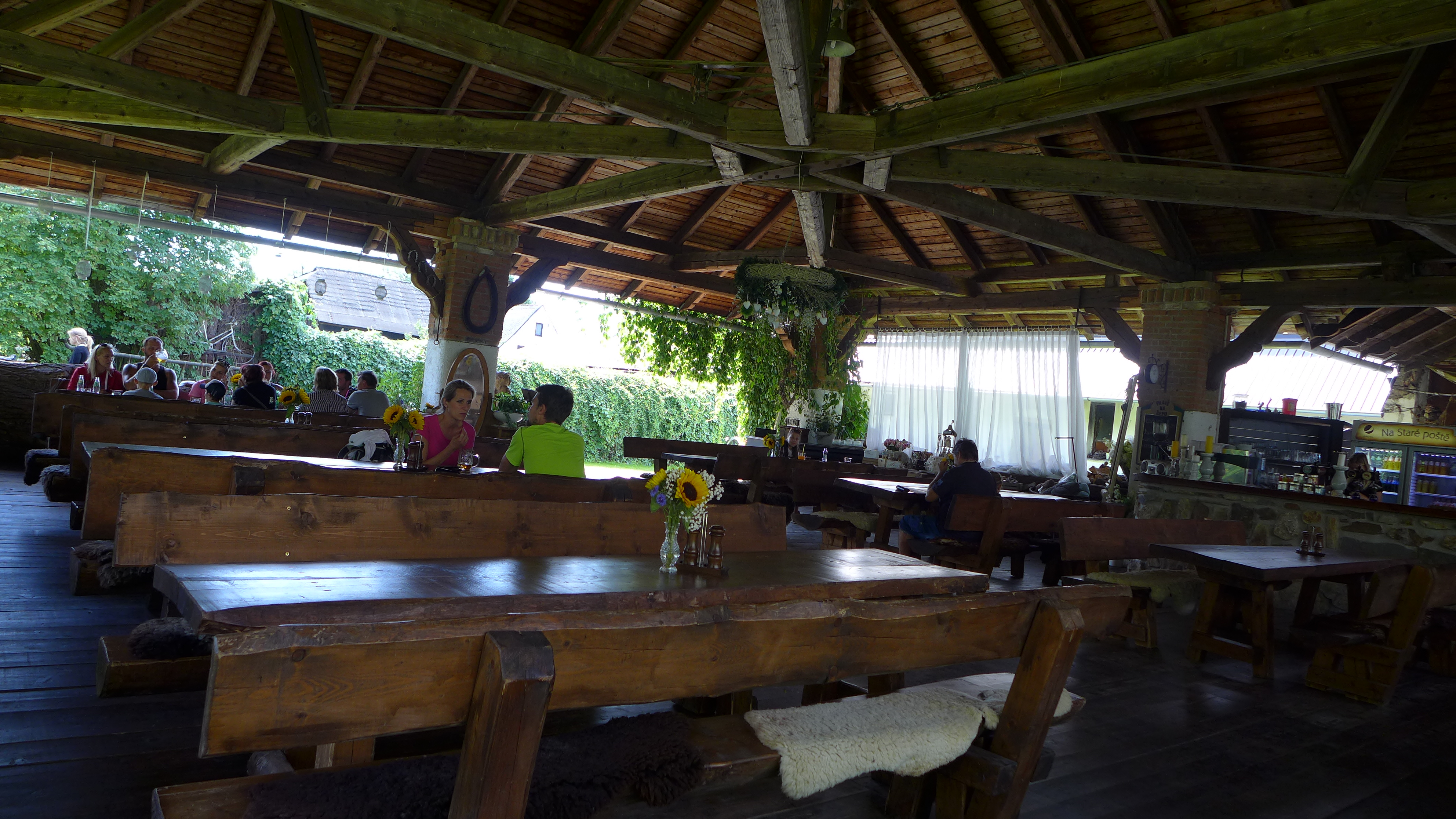 Podjezdová vozovna poštovní hospody, Filipová 65, Filipová.